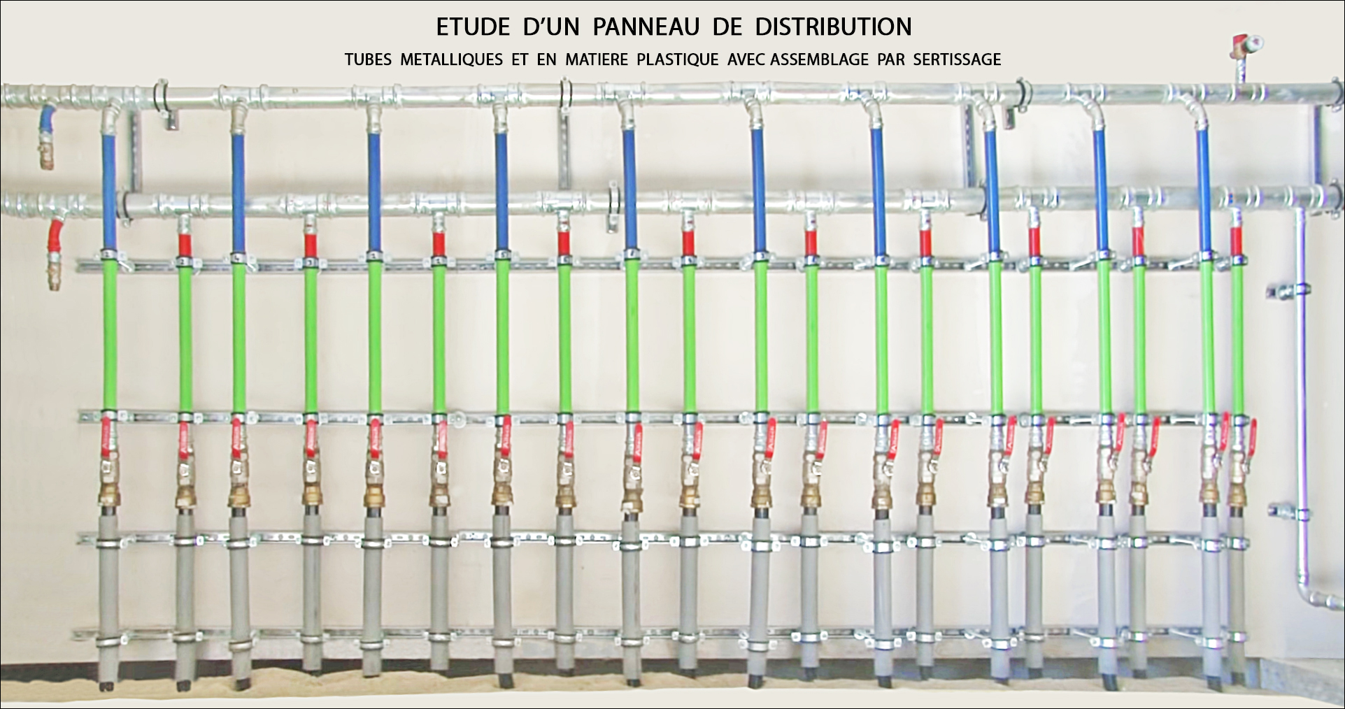 Étude d'un panneau de distribution en tube métallique et tube plastique.